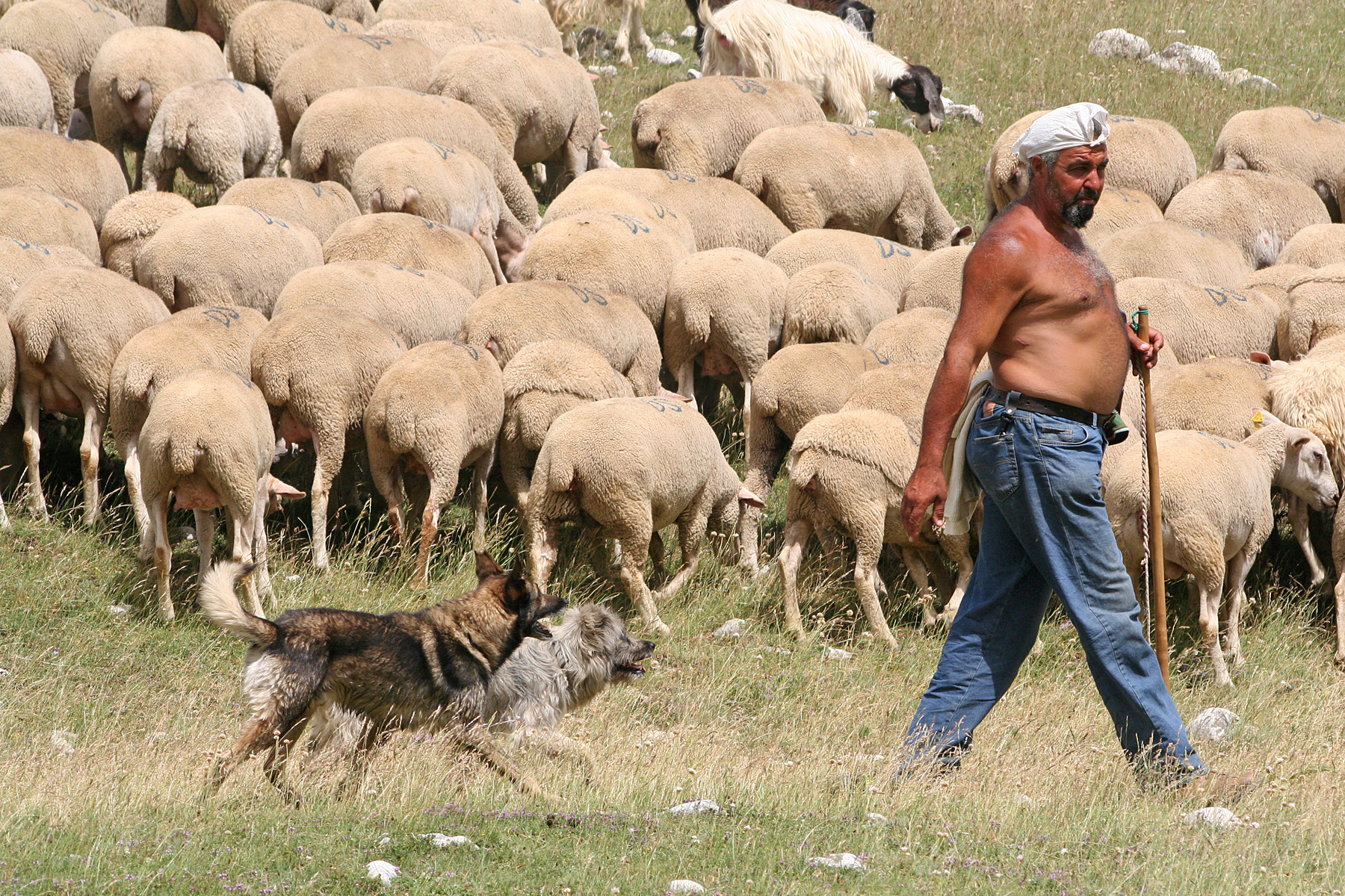 Campo Imperatore